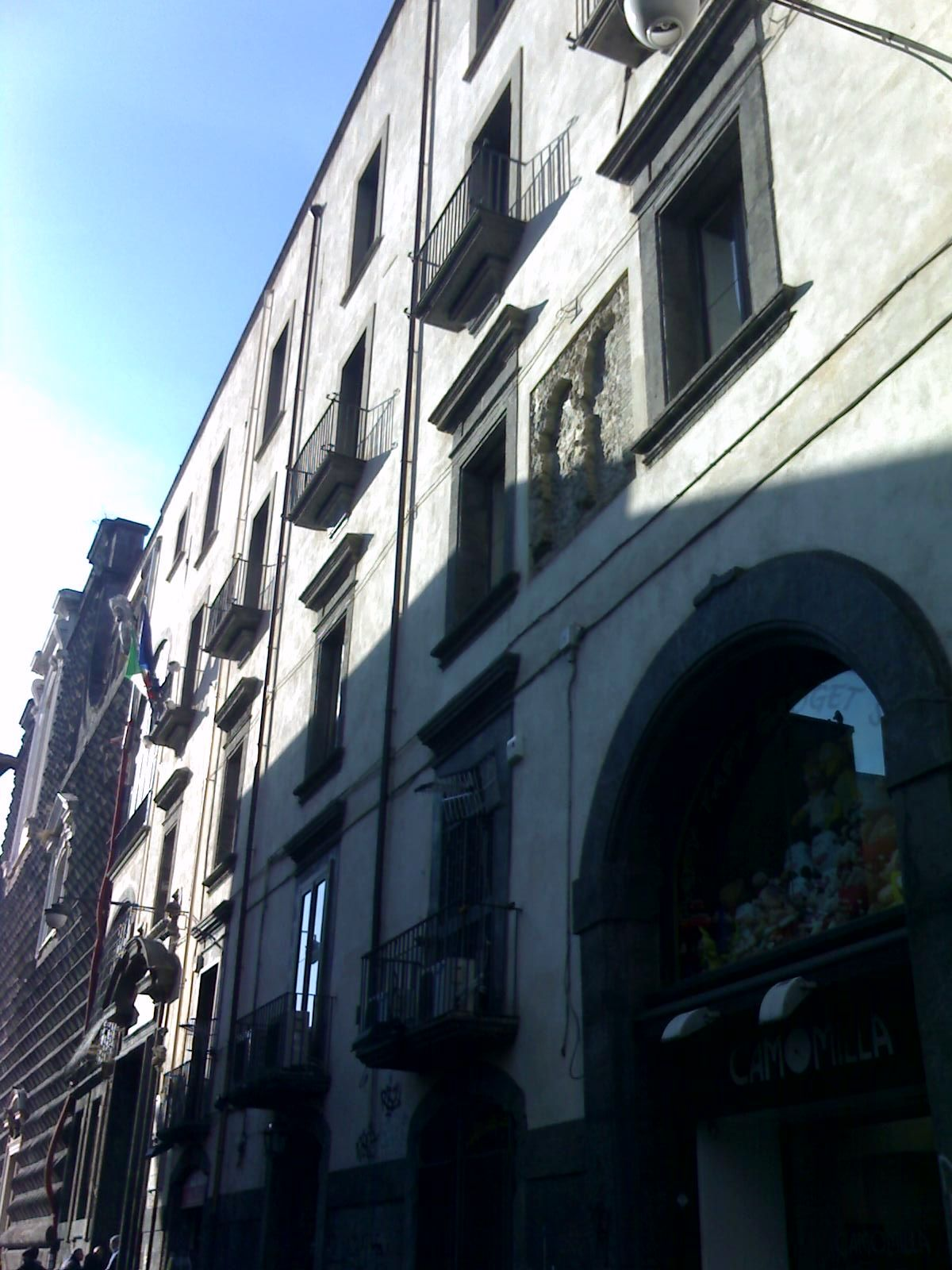 Istituto Fonseca di Napoli